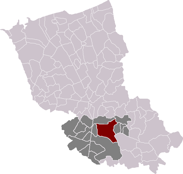 Locatie gemeente Hazebroek in arrondissement Duinkerke. Zelfgemaakt. Location of Hazebrouck municipality in the arrondissement of Dunkirk. Self made. Localisation de la commune d'Hazebrouck dans l'arrondissement de Dunkerque. Fait moi-même.